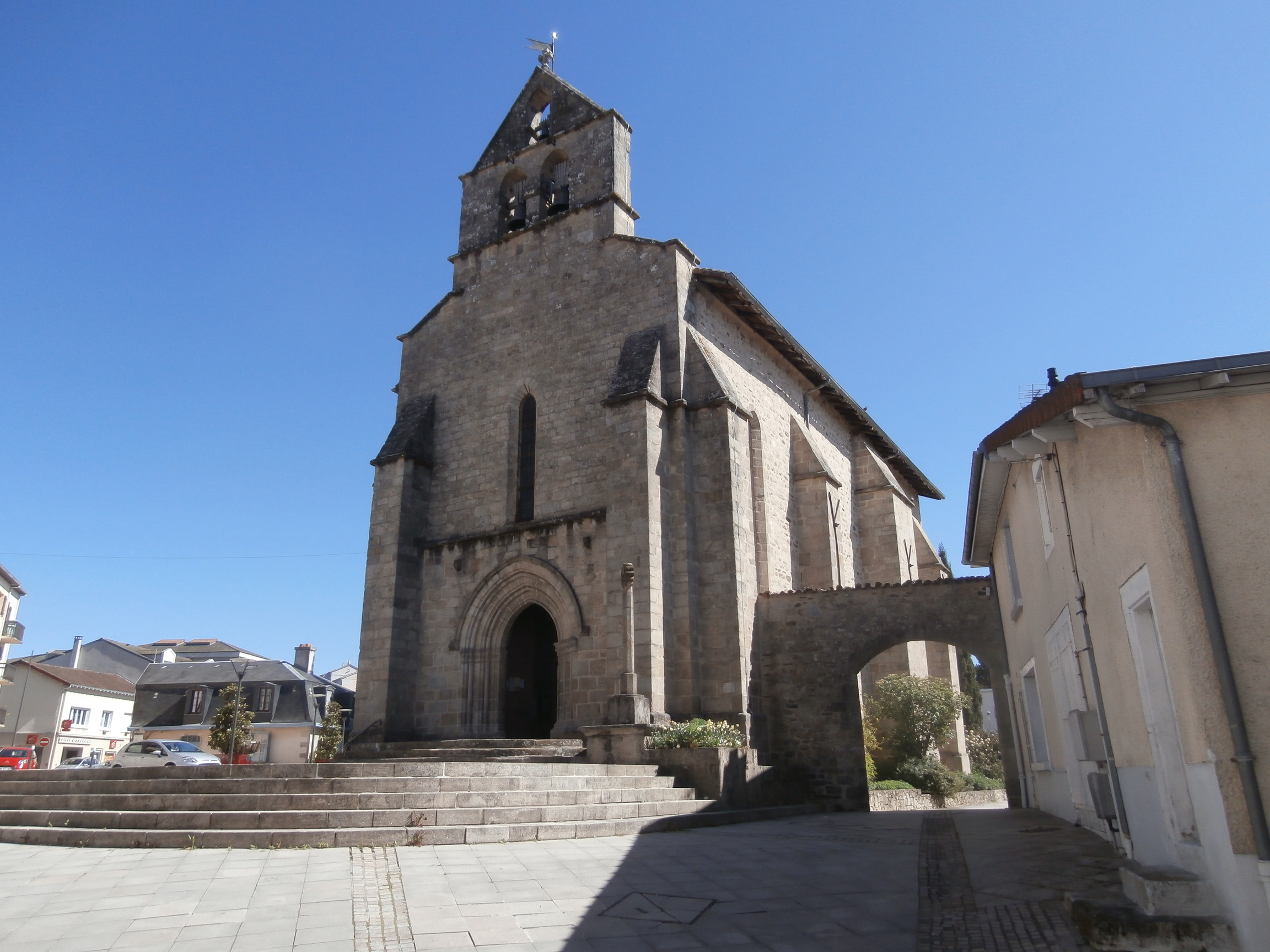 Église Saint-Martin d'Isle